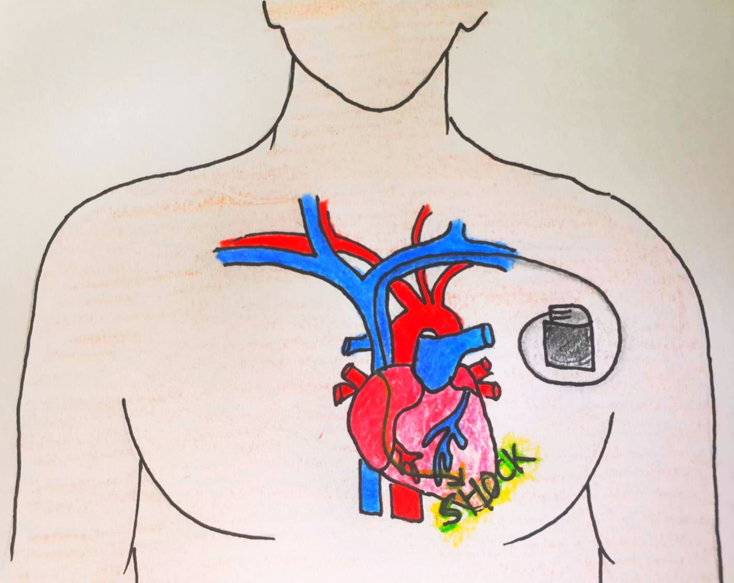 קוצב לב מסוג דפיברולטור אשר נותן "שוק חשמלי"